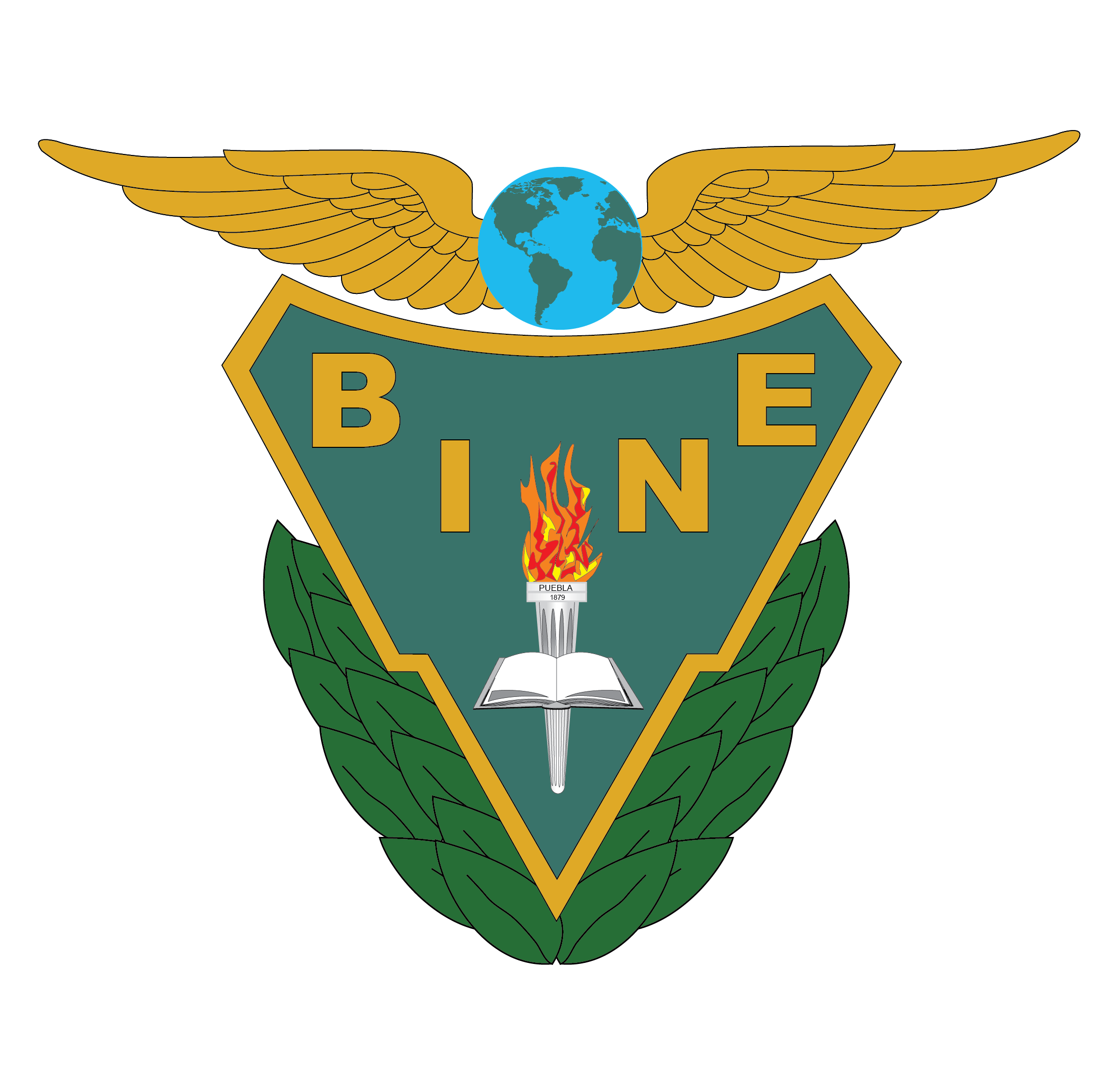 Logotipo Oficial del BINE 2014